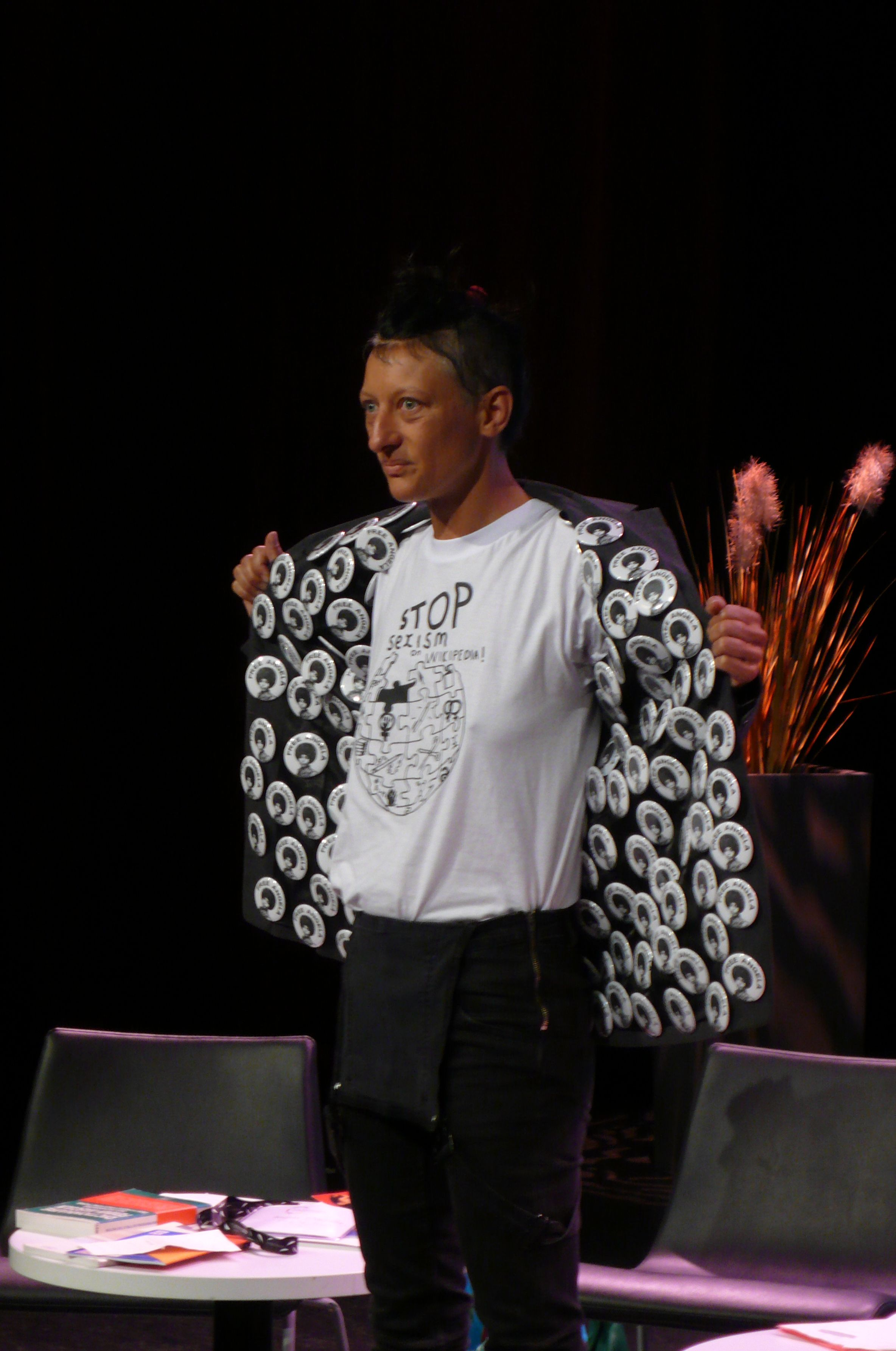 Performance d'Angela Marzulo pendant la WikiConvention francophone les 19-20-21 août 2016 à halle Pajol (Paris).